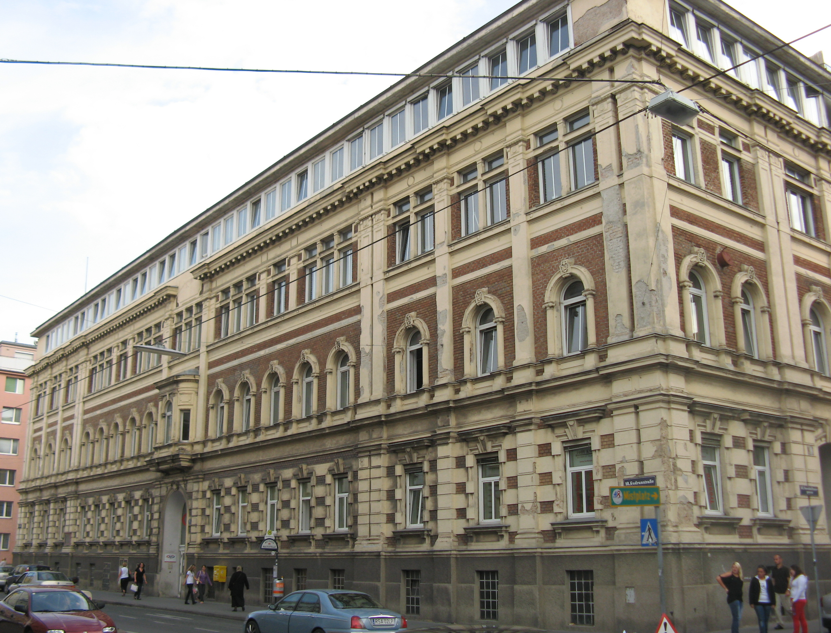 Ehemaliges Gebäude Brown Boveri (1890-91), Gudrunstraße 187, Wien-Favoriten